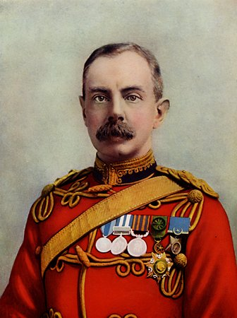 Herbert Plumer, 1st Viscount Plumer